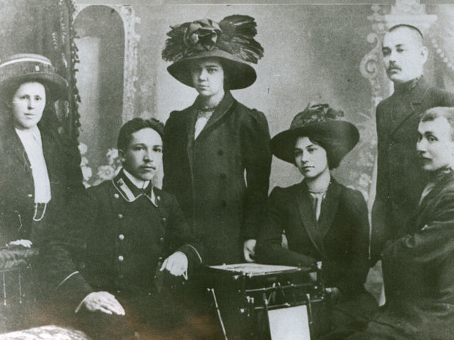 Сидят (слева направо): Габдрахман Мустафин, Амина Терегулова, Рахимбек Меликов. Стоят: Хадича Ямашева, Мадина Терегулова, Хусаин Ямашев.